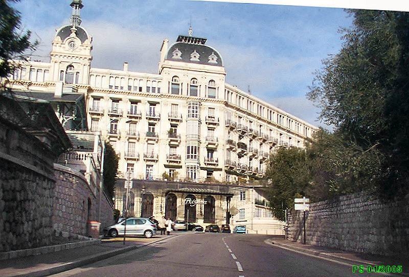 Nice - Quartiers de Nice Nice - Quartier Cimiez Le Palais Regina, ancien Hôtel Regina transformé par la suite en copopriétés. Photo 01/2005 en montant vers la colline vue du boulevard. Photo partielle du palais. Les jardins sont à gauche.